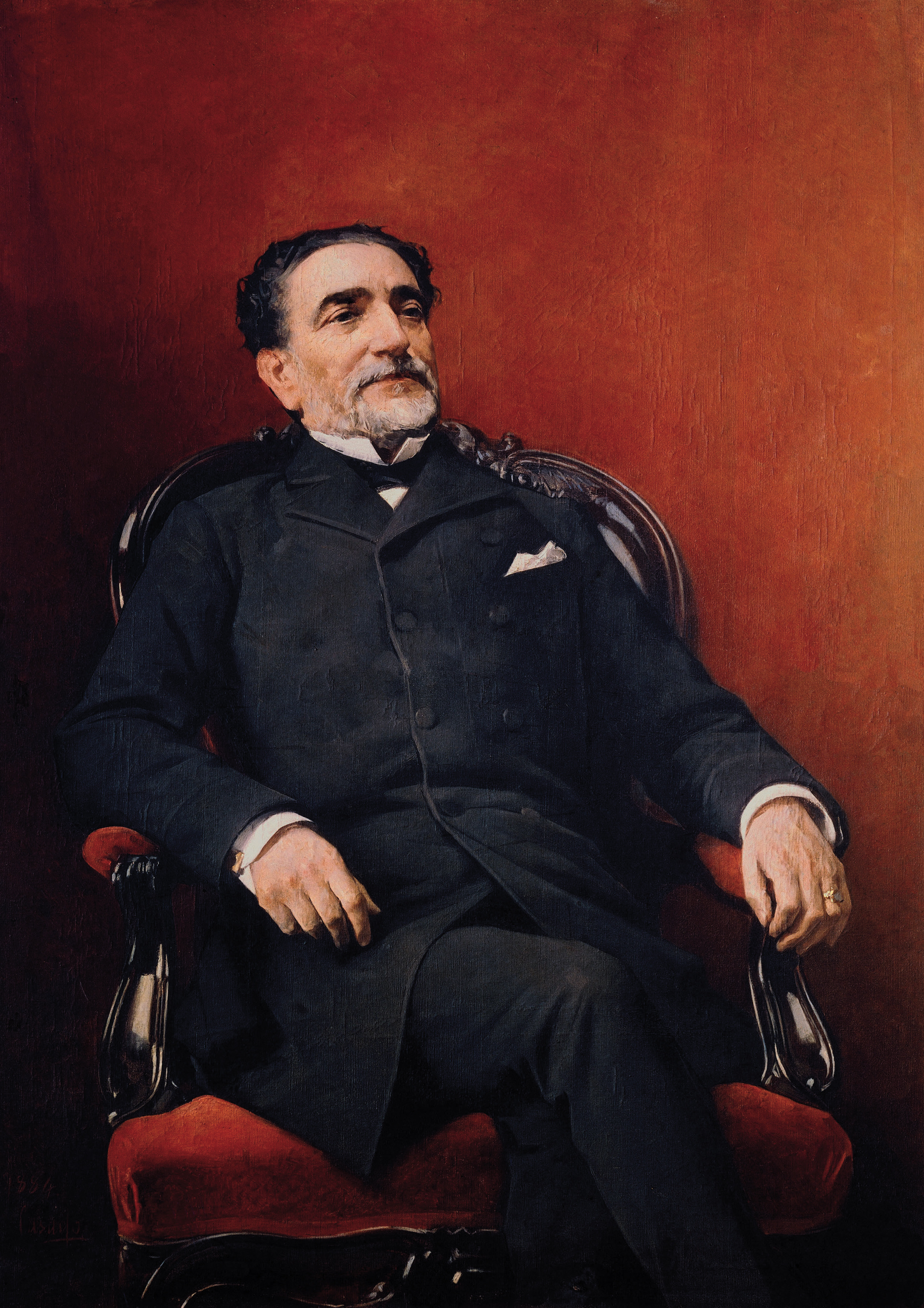 Retrato del politico español Práxedes Mateo Sagasta (1825-1903).